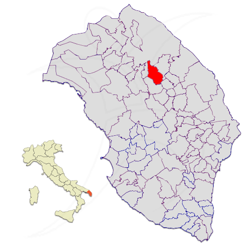 Il comune di Cavallino nella provincia di Lecce